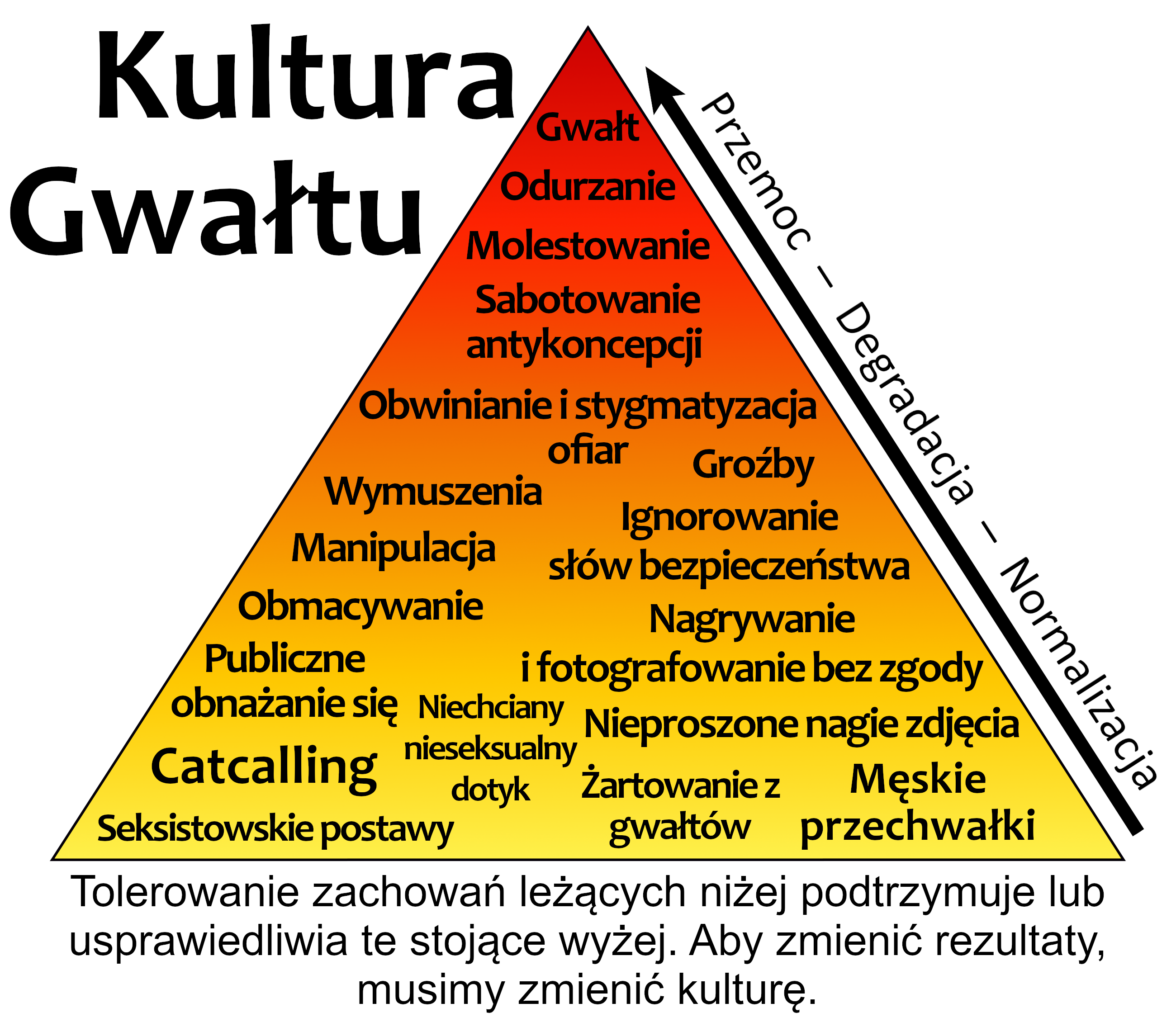 Polska wersja piramidy kultury gwałtu stworzonej przez